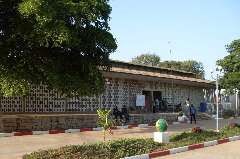 Batiment de la mairie de Natitingou datant de la période coloniale